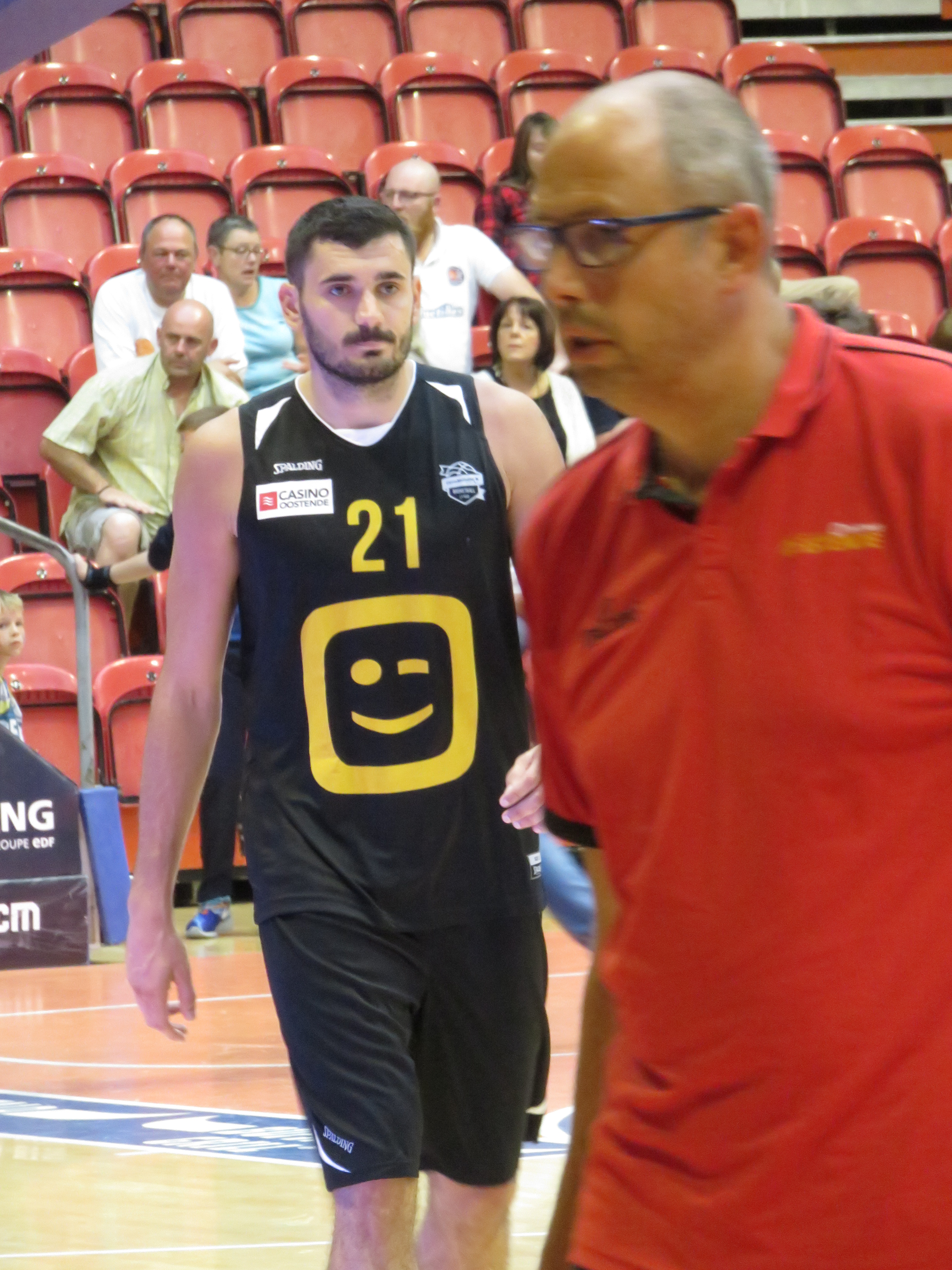 21 Marko Jagodić-Kuridža